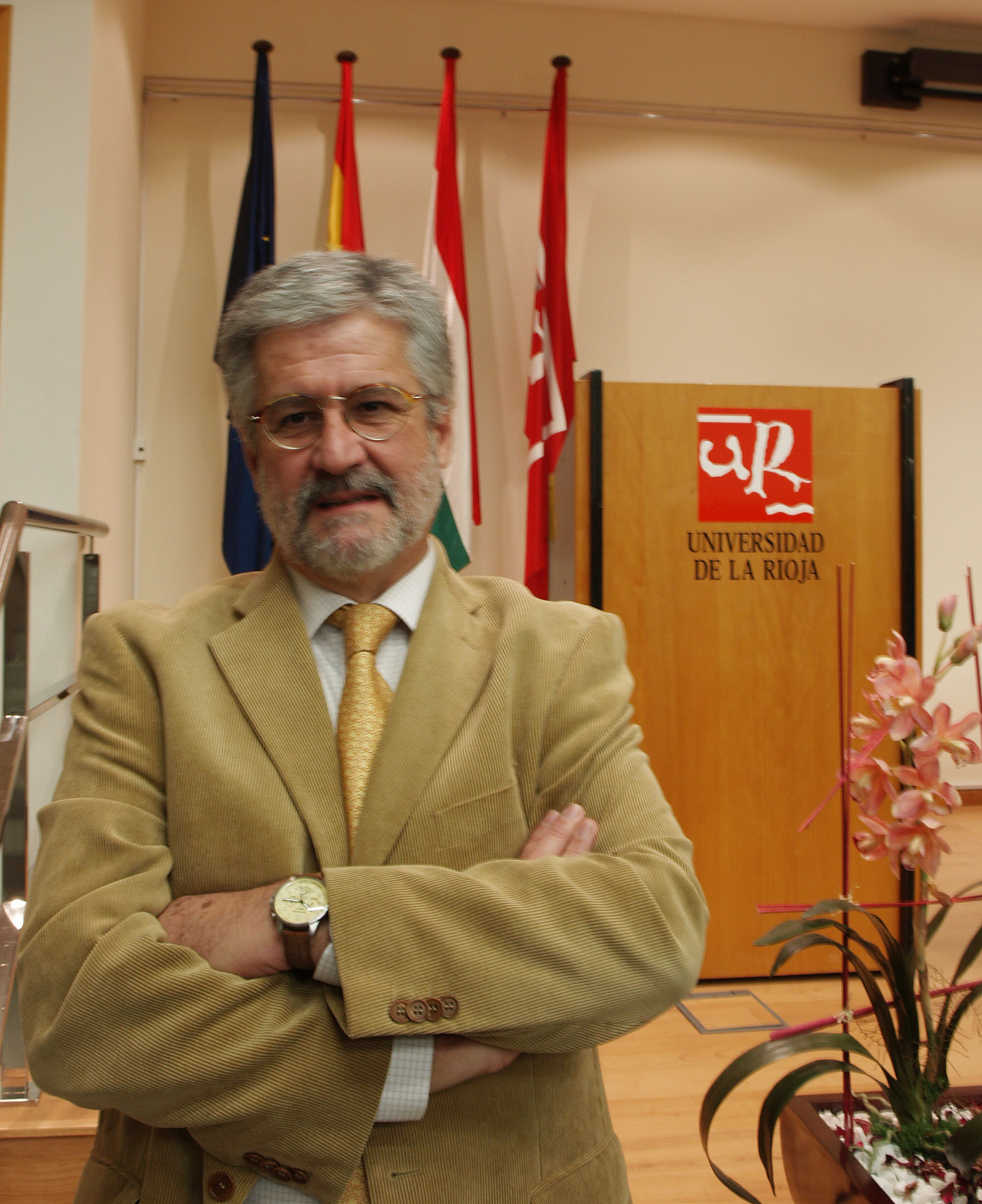 El político Manuel Marín, en el Aula Magna de la Universidad de La Rioja.